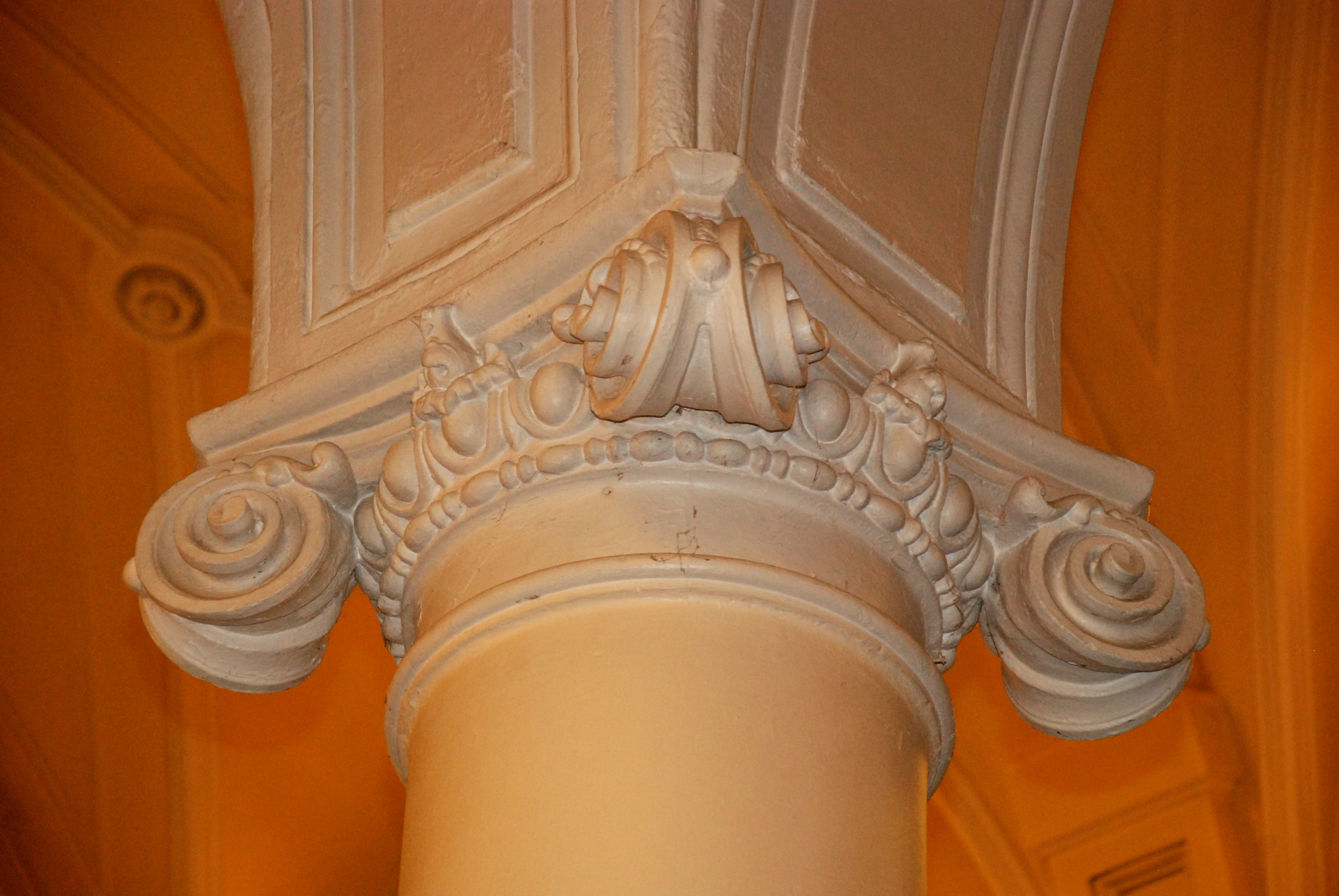 Belgique - Brabant wallon - Chastre - Église Sainte-Gertrude de Gentinnes